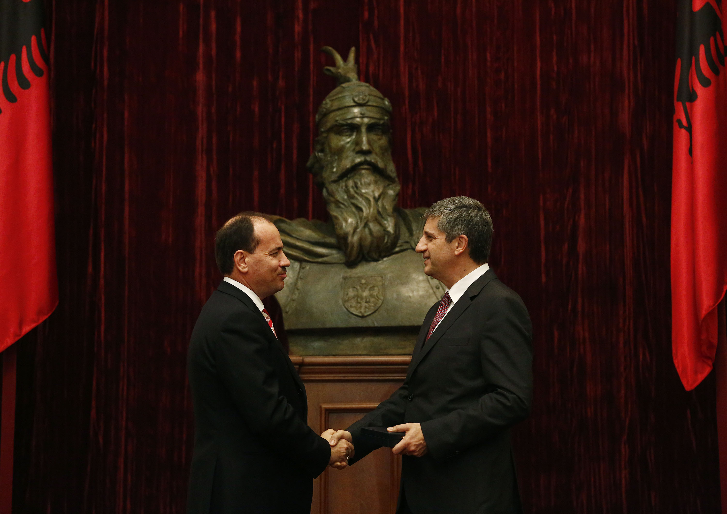 Eröffnung der Skanderbeg-Ausstellung, Außenminister Michael Spindelegger trifft den albanischen Präsidenten Bujar Nishani, Tirana, Albanien, 22.11.2012.